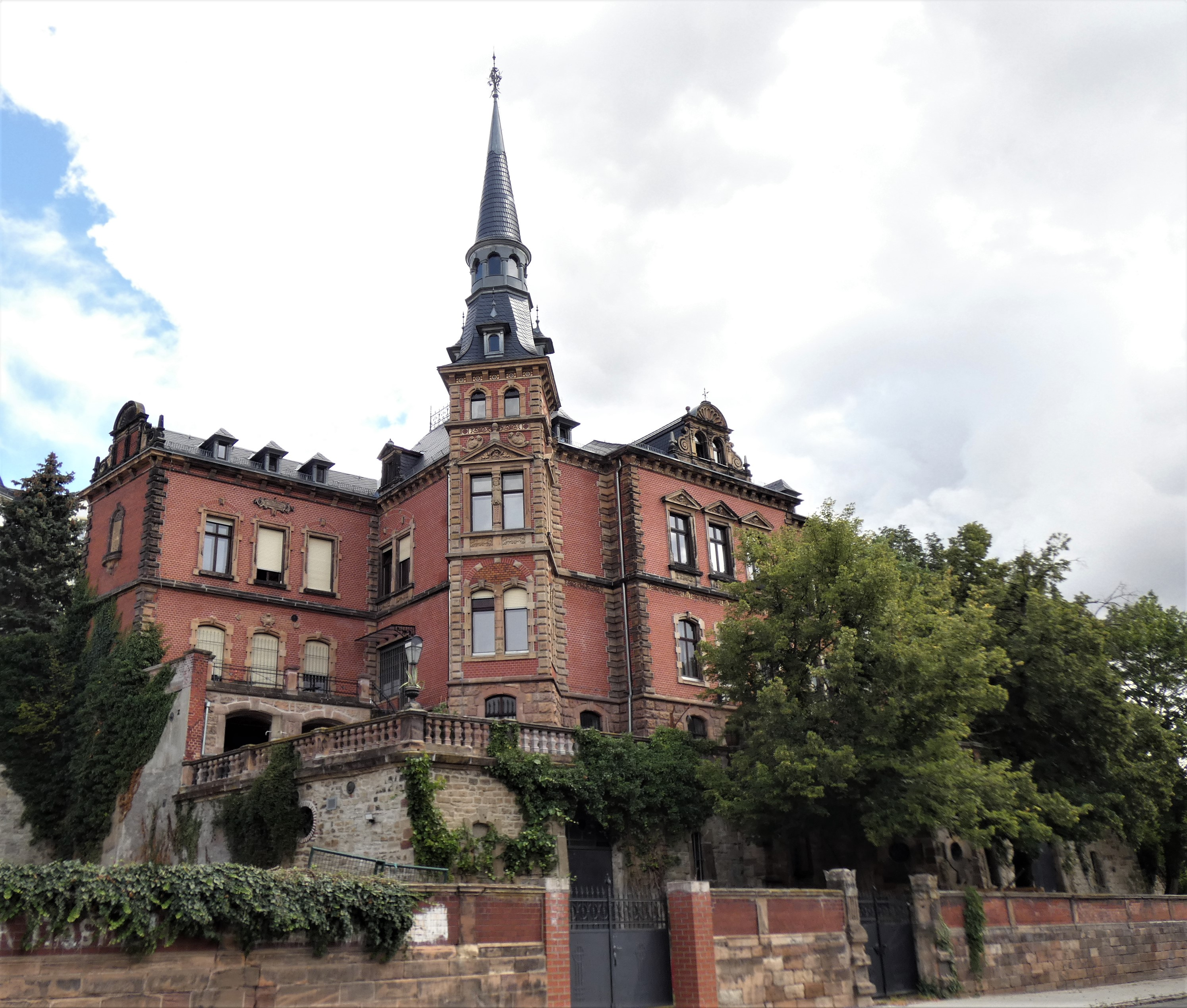 Sogen. Dietrische Villa, Am Mühlberg 4, Weißenfels, Ansicht von der Markwerbener Straße